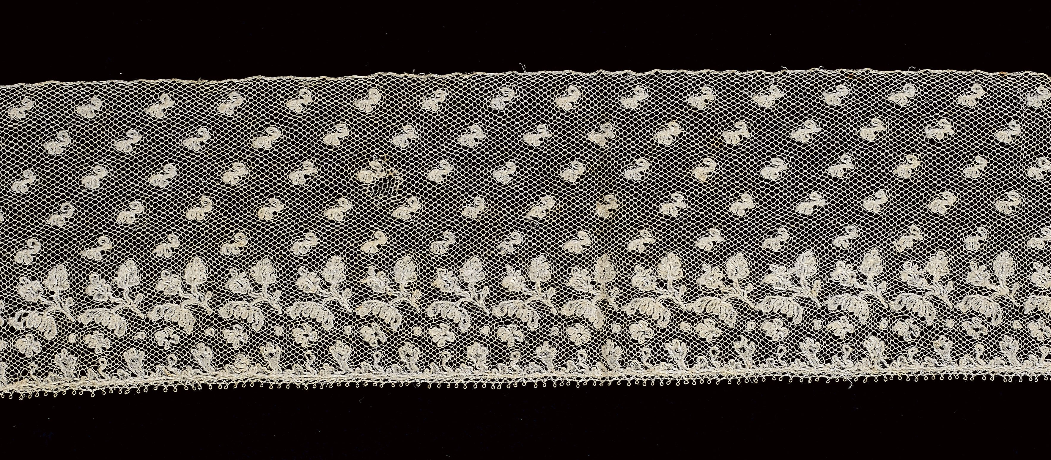 Lace-Bobbin Lace